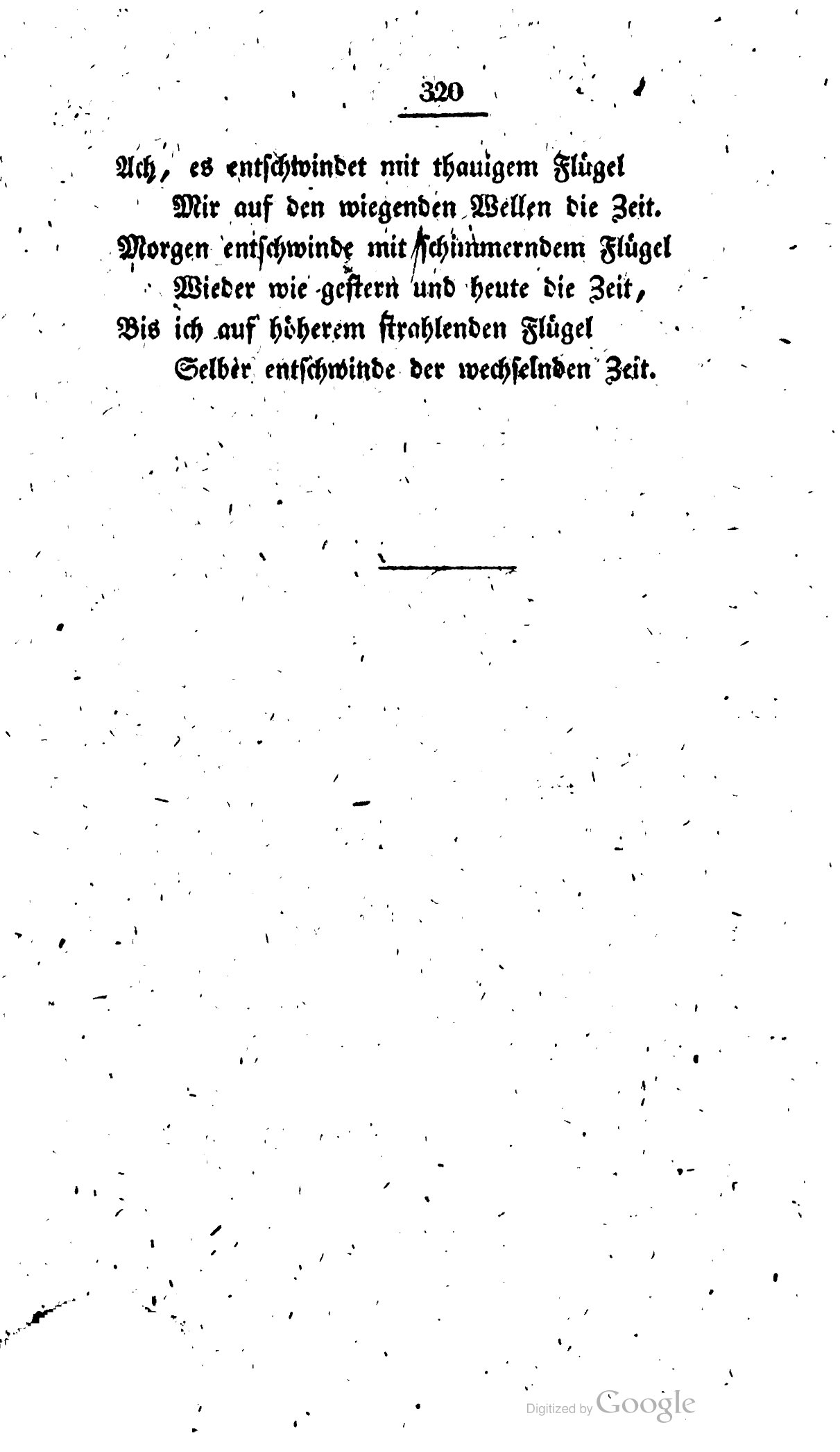 Scan from Book: Gesammelte Werke der Brüder Christian und Friedrich Leopold Grafen zu Stolberg. Erster Band. S. 319-320. Hamburg Perthes, 1827.